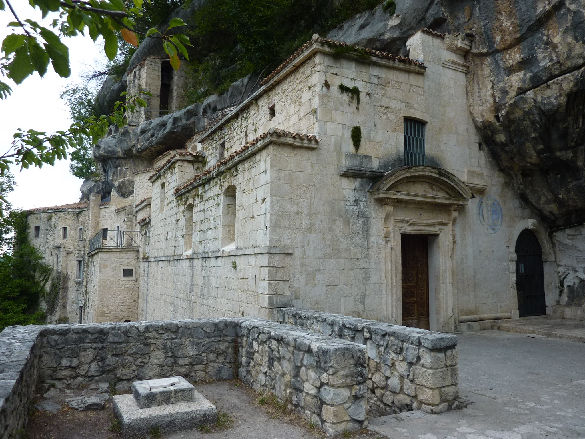 Eremo di Santo Spirito a Majella